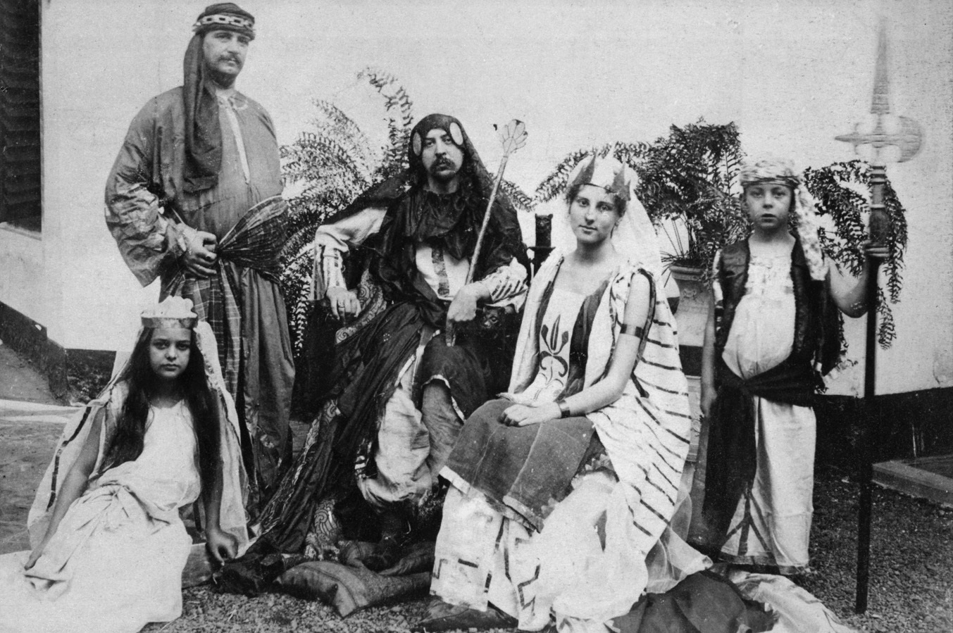 1899 Tegal Java - Cornelia (Keetje) Serrurier als Esther (en Louis Couperus als Assuérus). "Keetje had de rol van Esther, Hans Ellinger, de zoon van de dokter, was sleepdrager en Edmée Valette ‘suivante’. Controleur Ketjen speelde twee rollen, die van Mardochée en van Aman. En Louis zelf speelde de rol van koning Assuérus, een van de hoofdrollen."